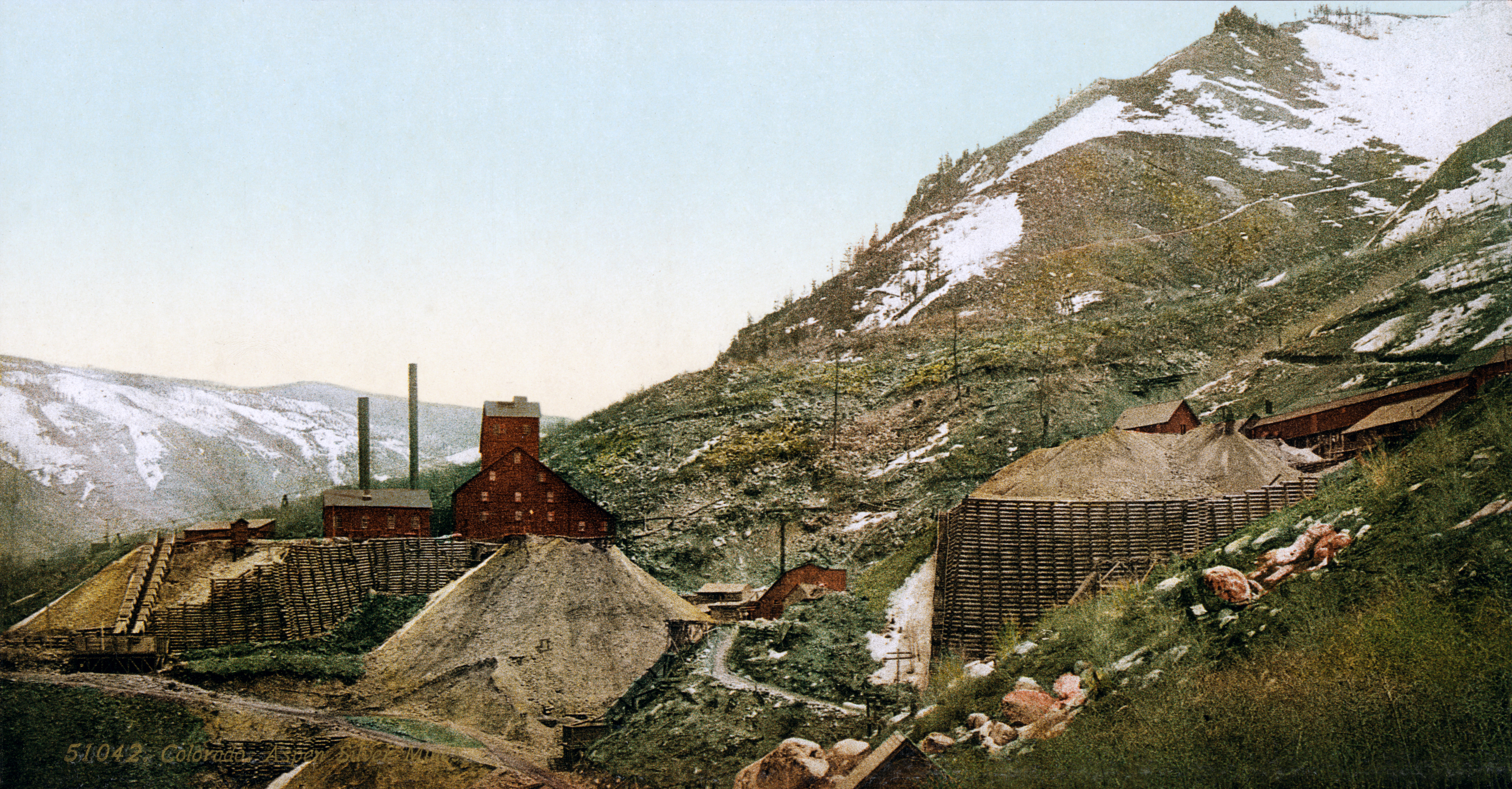 51042. Colorado. Aspen silver mines.